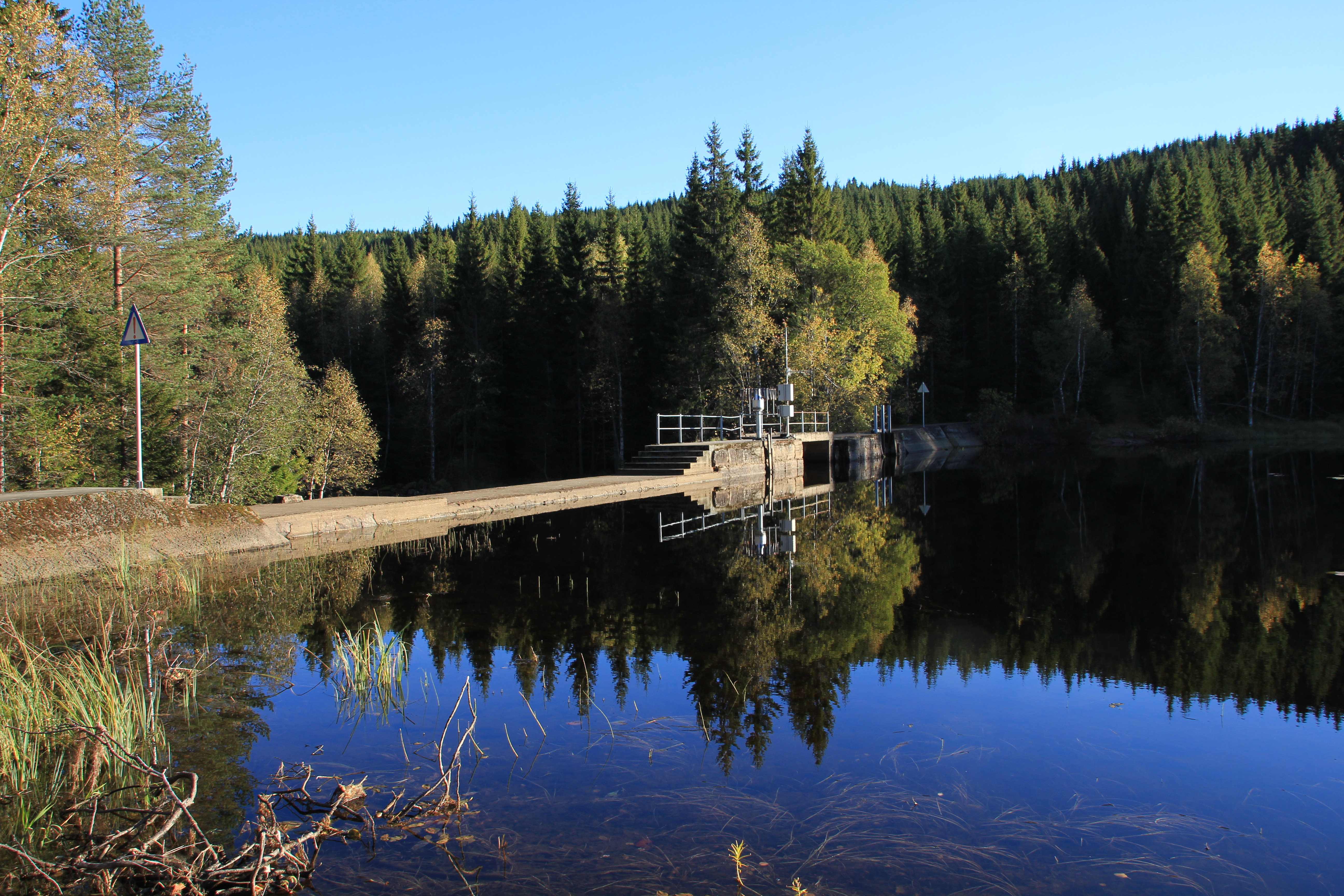 Demningen i enden av Skrukkelisjøen, Hurdal, Akershus.